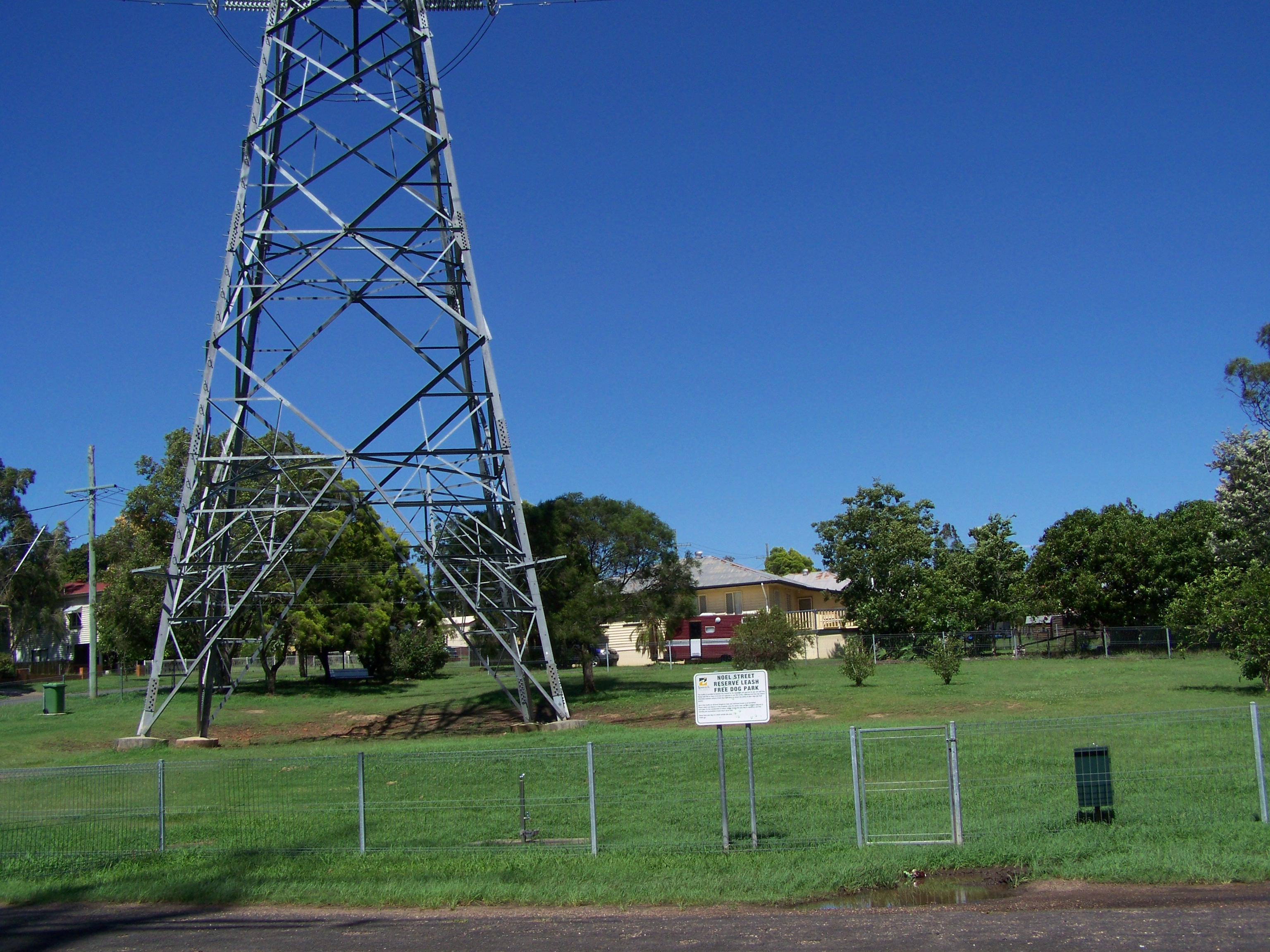 Free dog park